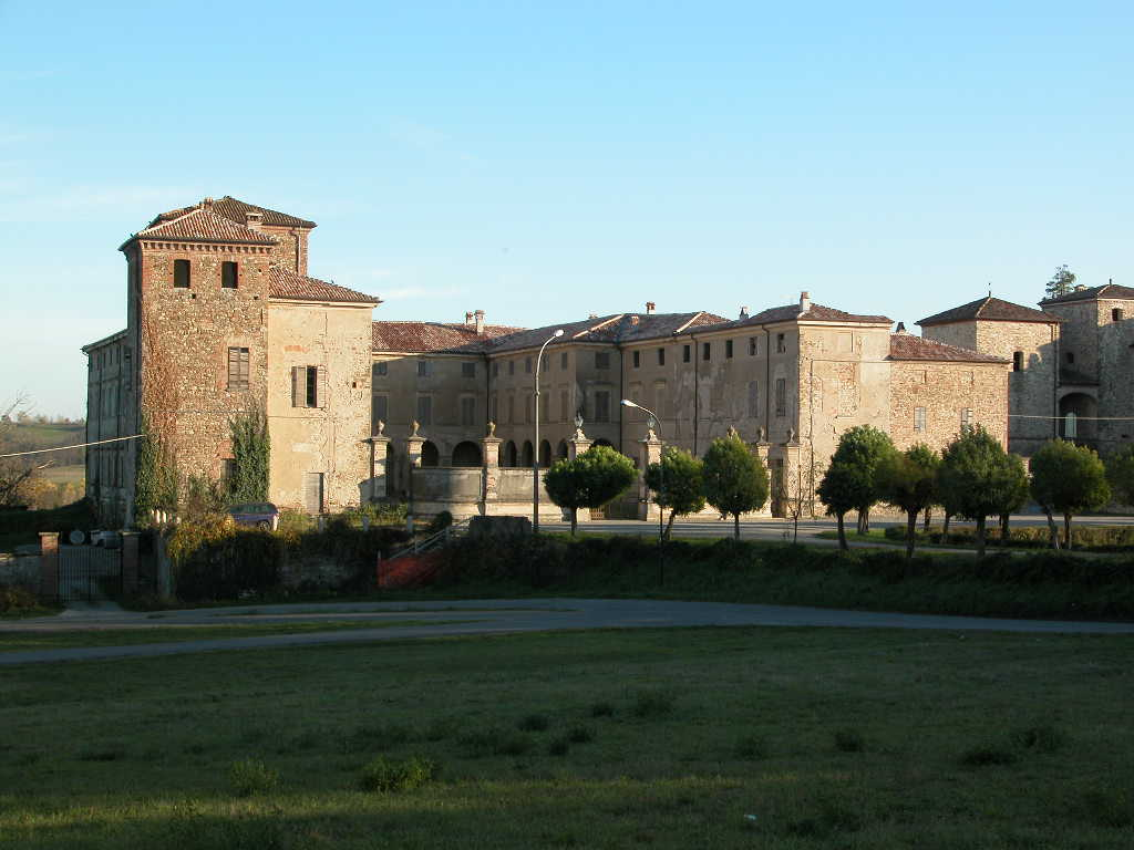 Foto mia personale, castello di Agazzano, palazzo residenziale, 2007